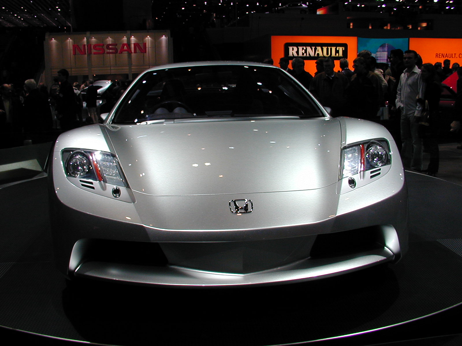 Salon de Genève 2004 SAG2004 132 Honda prototype